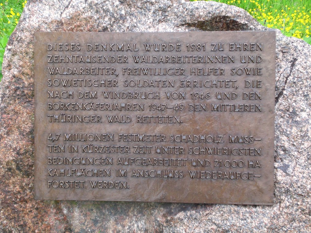 Forstarbeiterdenkmal Oberhof, Inschrifttafel